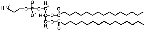 Phosphatidylethanolamin